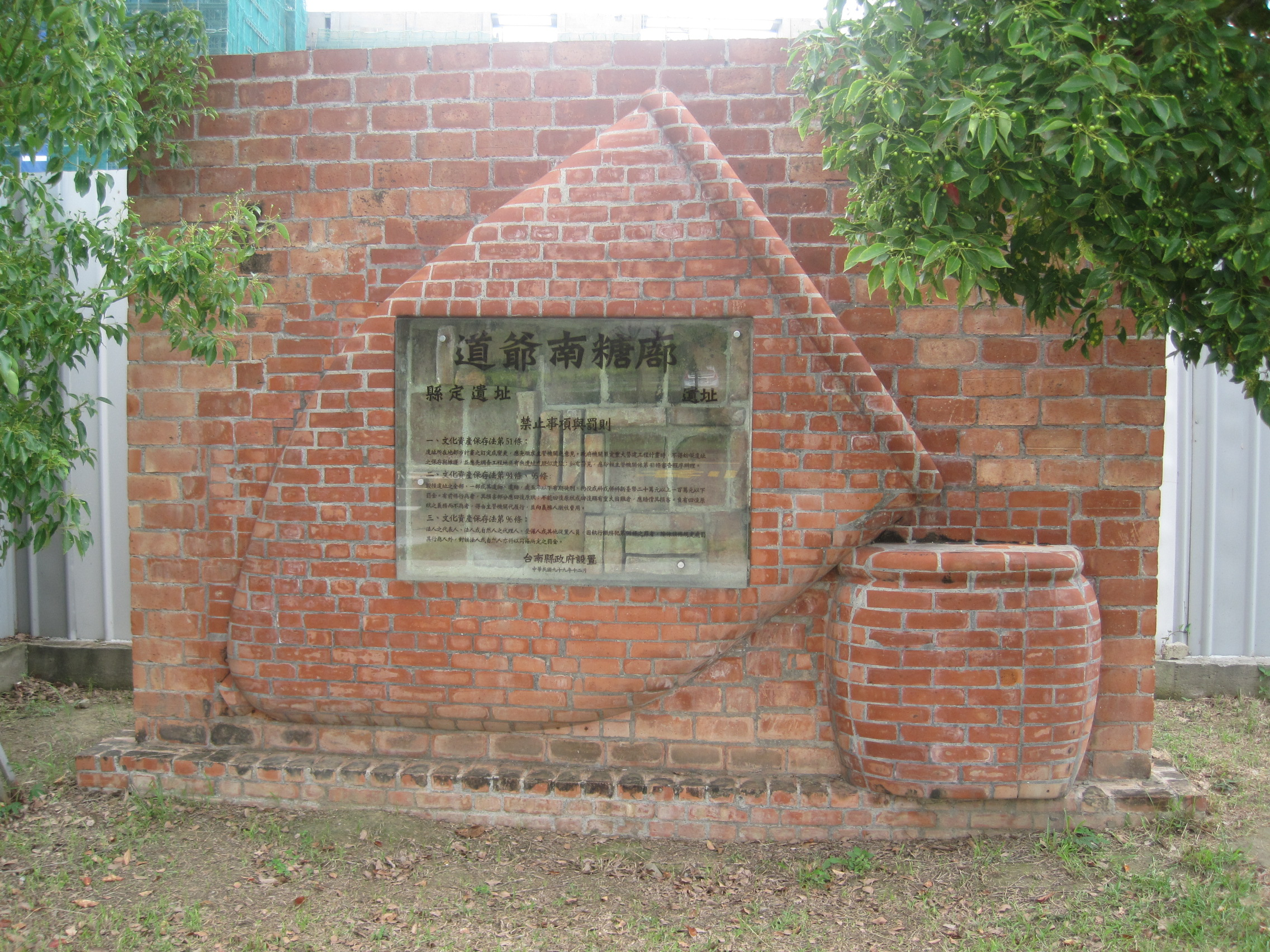 道爺南糖廍遺址意象